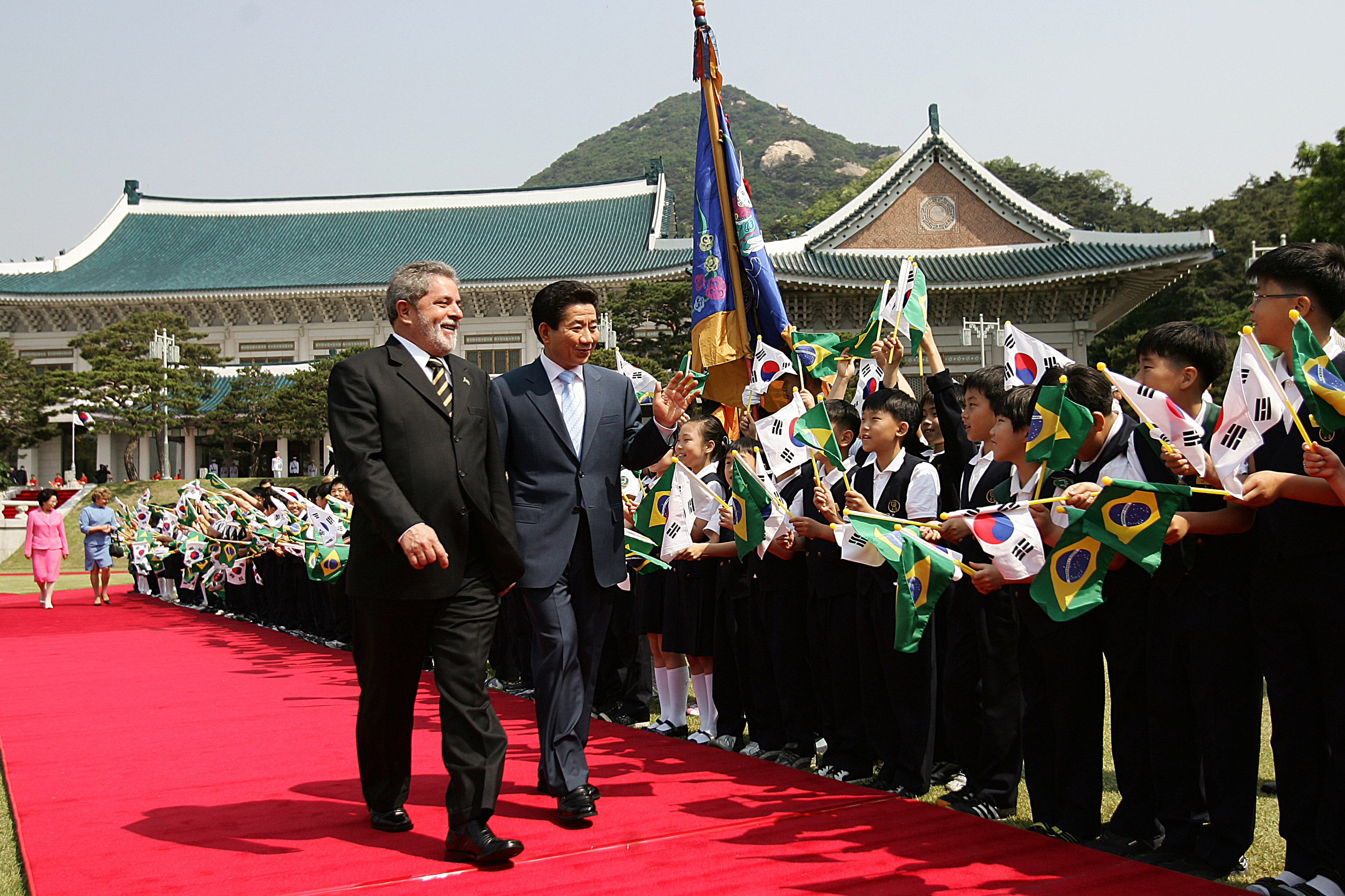 O Presidente do Brasil, Luiz Inácio Lula da Silva e o Presidente da Coreia do Sul, Roh Moo-hyun, são recebidos por crianças na cerimônia oficial de chegada em Seul, em 24 de maio de 2005.